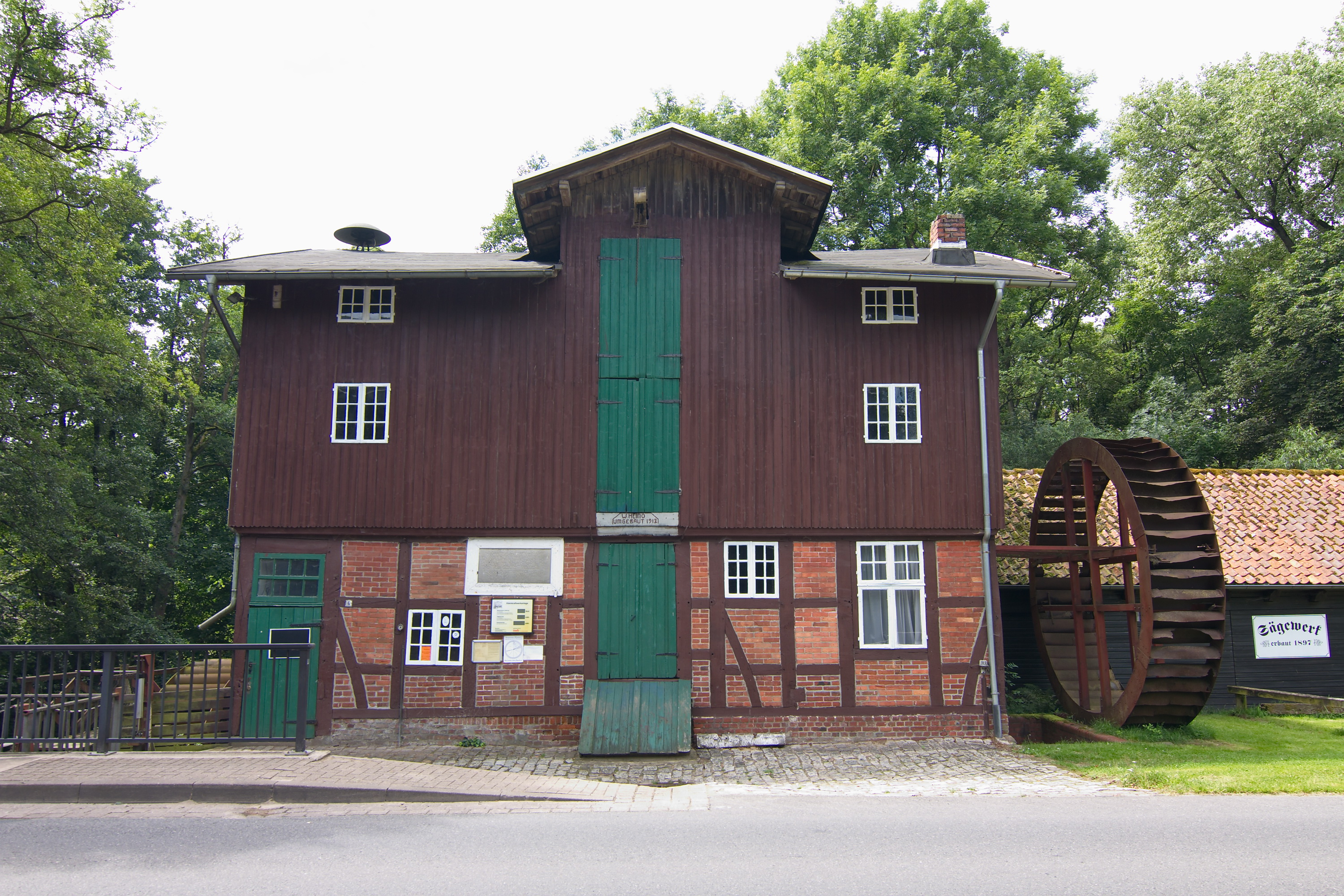 Wassermühle in Lünzen (Schneverdingen), Niedersachsen, Deutschland